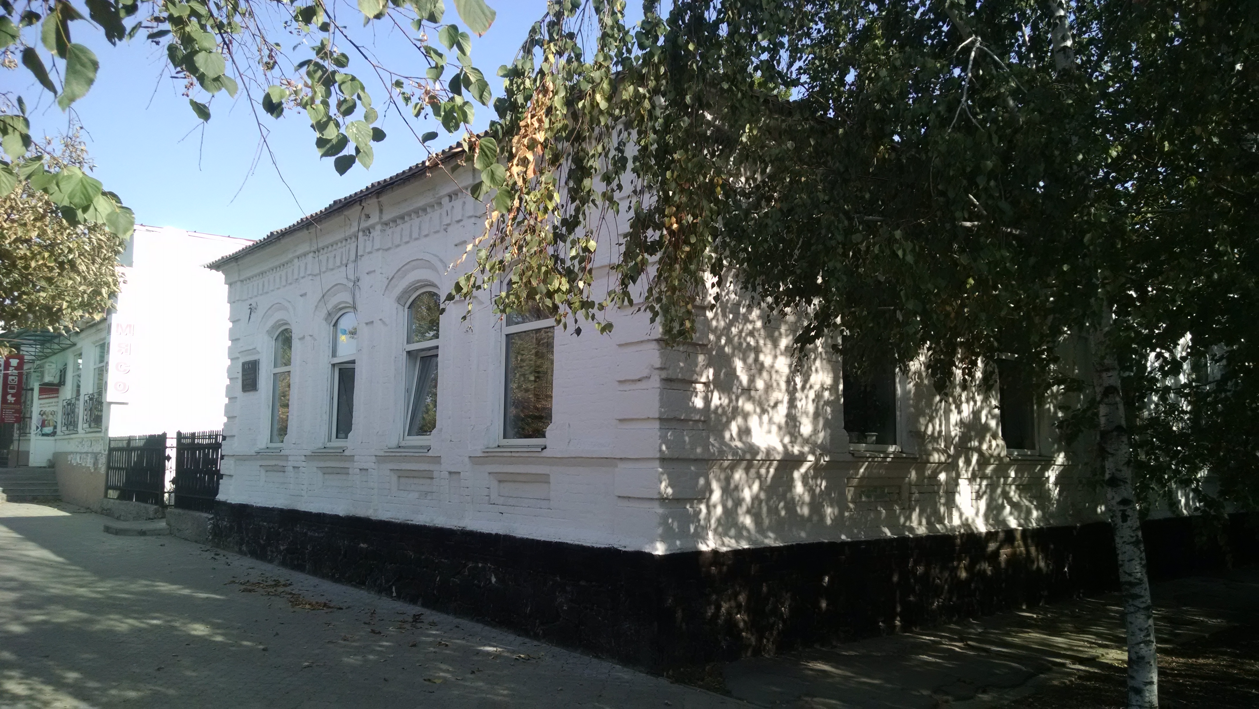 Будинок купця Карапєєва (кінець XIX ст. - початок XX ст.)